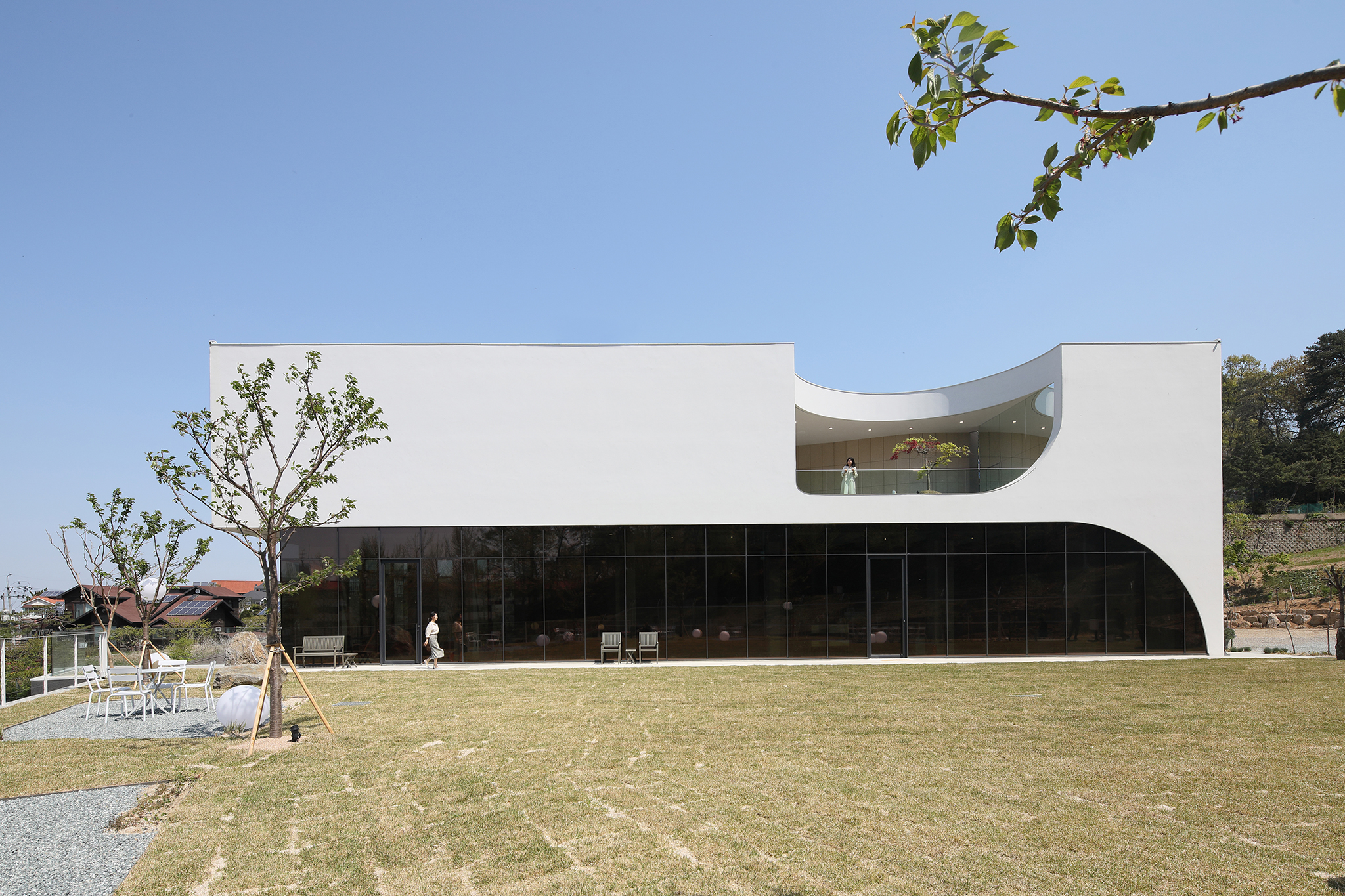 청주시 상당면 남일면 효촌리 77-2번지에 위치한 카페 에클로그는 건축사 안응준에 의해 설계된 건축물이다.